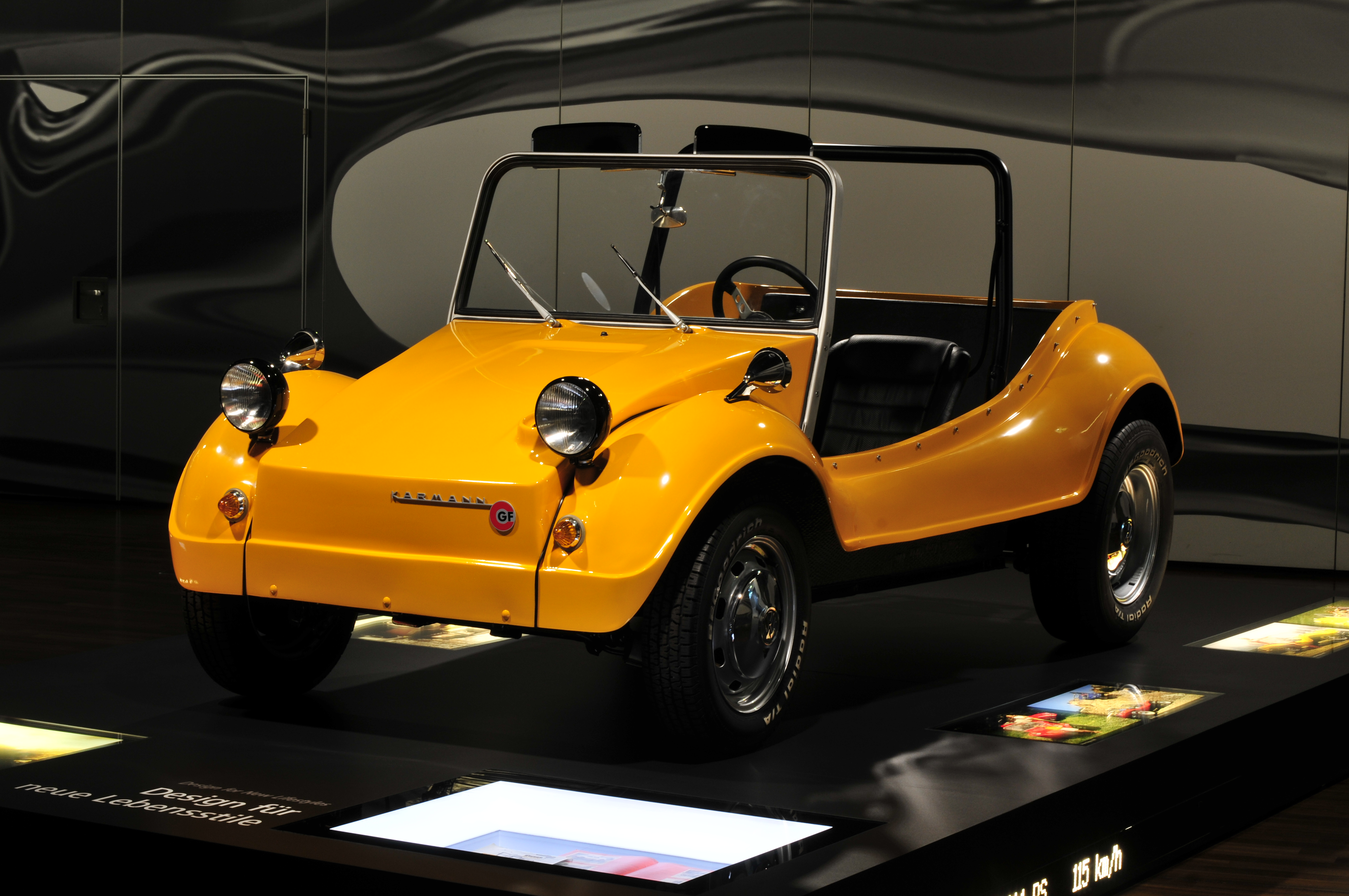 Autostadt Wolfsburg; Karmann GF Buggy